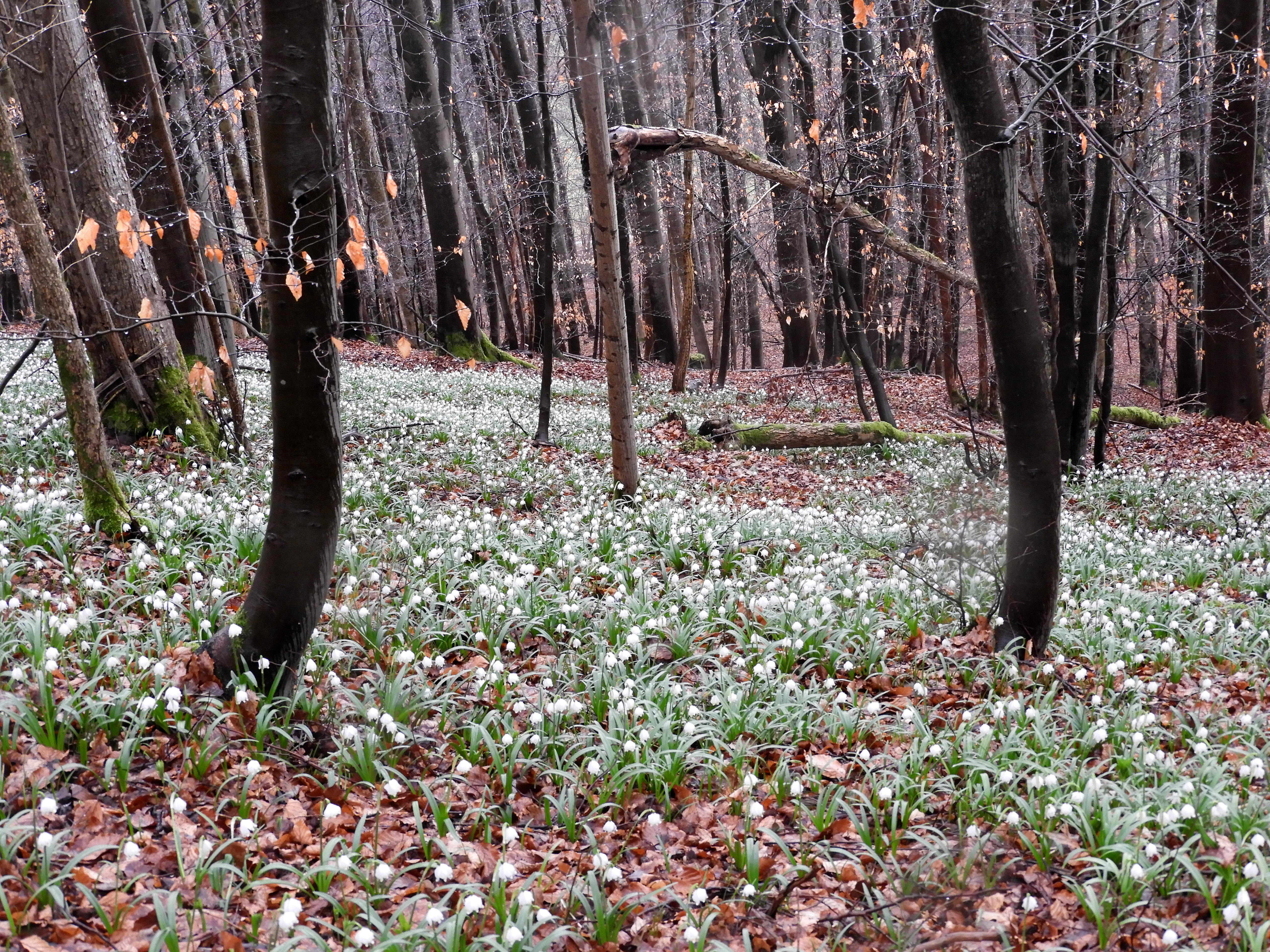 Die Graburg im nordhessischen Ringgau ist ein Bergstock aus Muschelkalk, der über einem Sockel aus Oberem Buntsandstein, der Röt genannt wird, liegt. Naturnahe Kalkbuchenwälder, Felsen und Bergstürze prägen das Gebiet in besonderer Weise. Wegen ihrer landschaftlichen Schönheit und Eigenart sowie ihrer Bedeutung als Lebensraum für seltene und bestandsgefährdete Tier- und Pflanzenarten wurde die Graburg in dem Jahr 1915 als Naturdenkmal und ab Mai 1965 als Naturschutzgebiet unter besonderen Schutz gestellt. Als Wuchsort seltener Pflanzengesellschaften und aufgrund ihres außergewöhnlichen floristischen Reichtums wird die Graburg zu den bedeutendsten Naturschutzgebieten in Hessen gezählt. Die hier vorhandenen zahlreichen Vegetationseinheiten, die in großer Vielfalt und einer charakteristischen Abfolge vorkommen, gelten als wertvoll für Forschung und Lehre. Als besonders schutzwürdig werden auch die orchideenreichen Kalkmagerrasen, der hessenweit größte Eibenbestand, die großen Bergstürze mit ihren Blaugrashalden sowie die zahlreichen Höhlen in den Felsbereichen als Winterquartiere für gefährdete Fledermausarten angesehen.